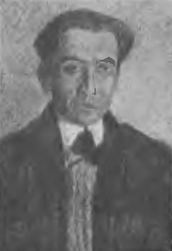 Tadeusz Nalepiński